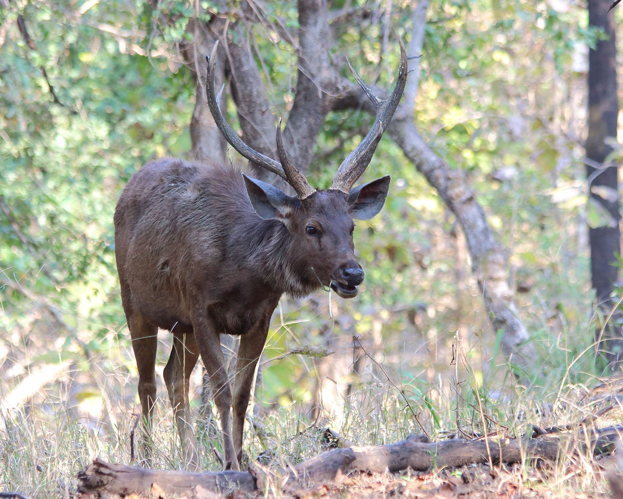 Sambar, Pench (Inde)